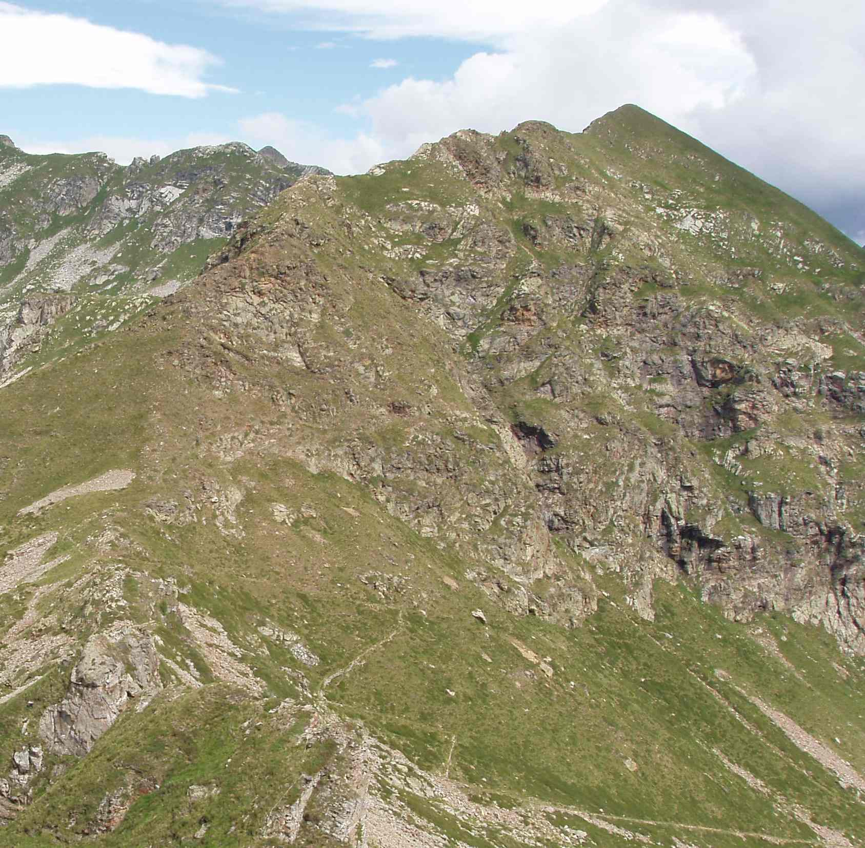 Il Colle e la Punta della Gragliasca dal Gran Gabe